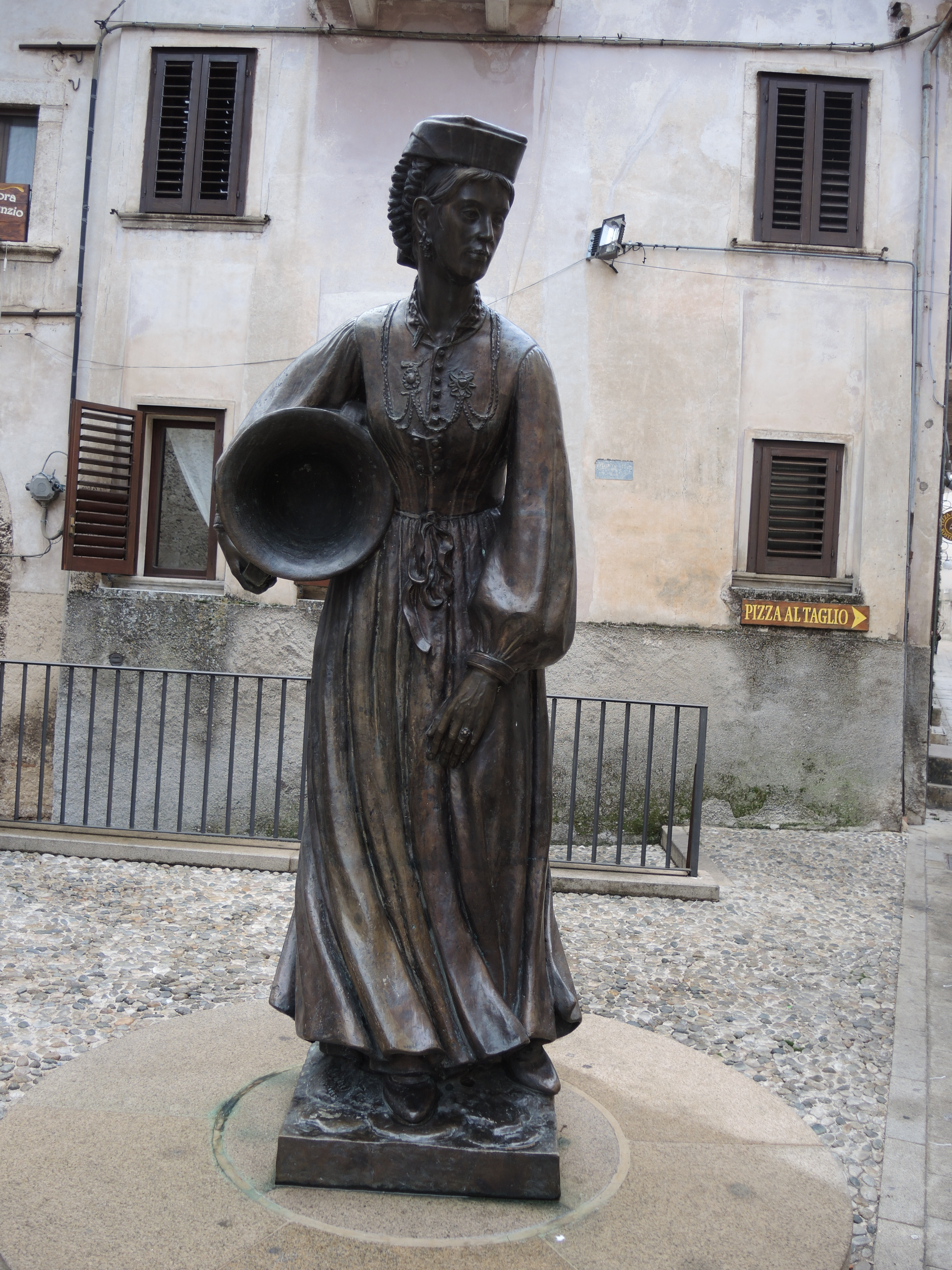 Scanno